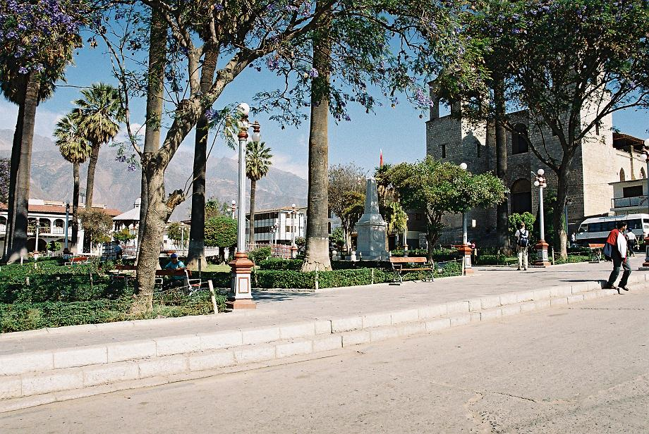 Central Plaza in Caraz